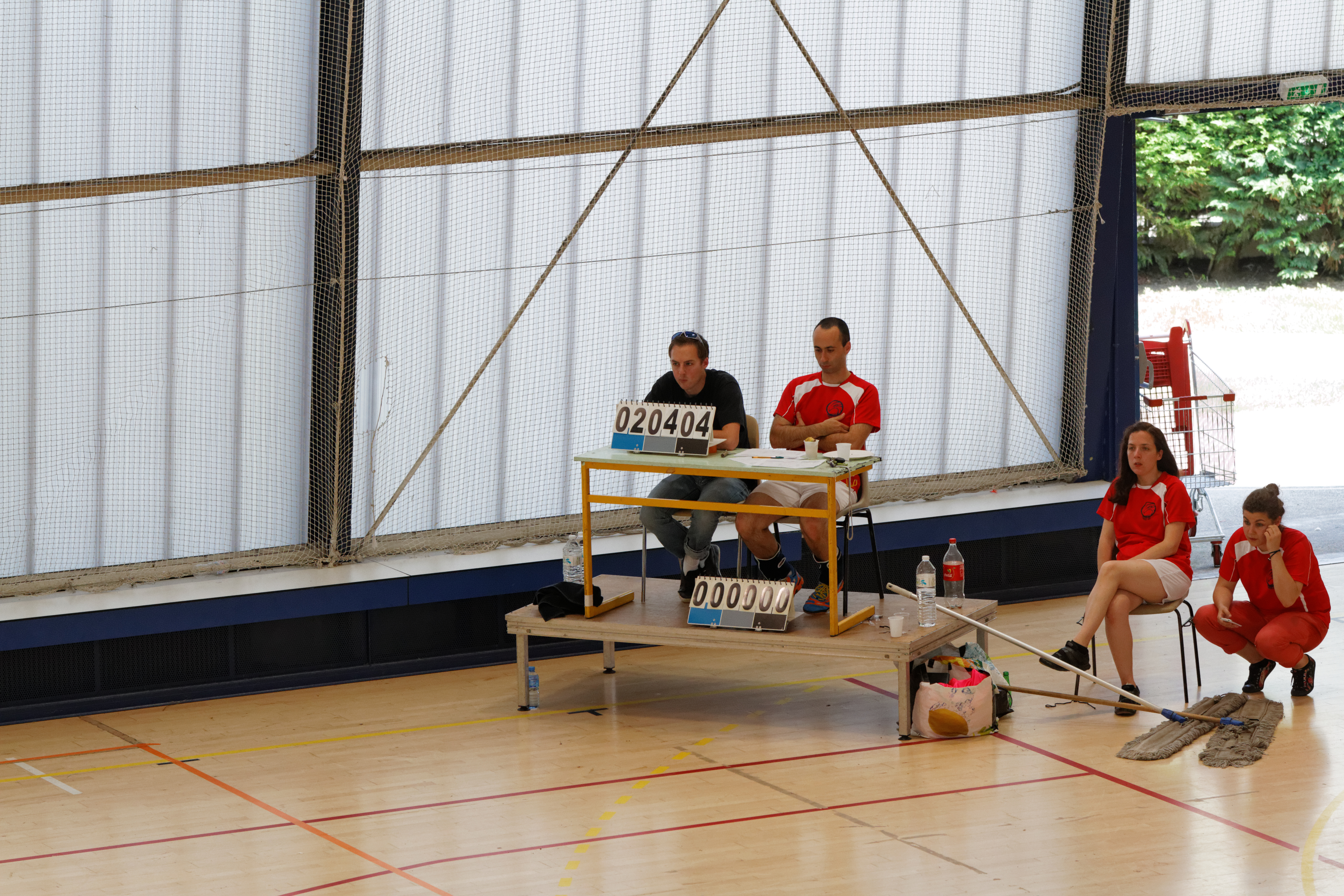 20e journée du championnat de France 2013-2014 de Kin-Ball, 8 juin 2014, Gymnase George Carpentier, Paris.